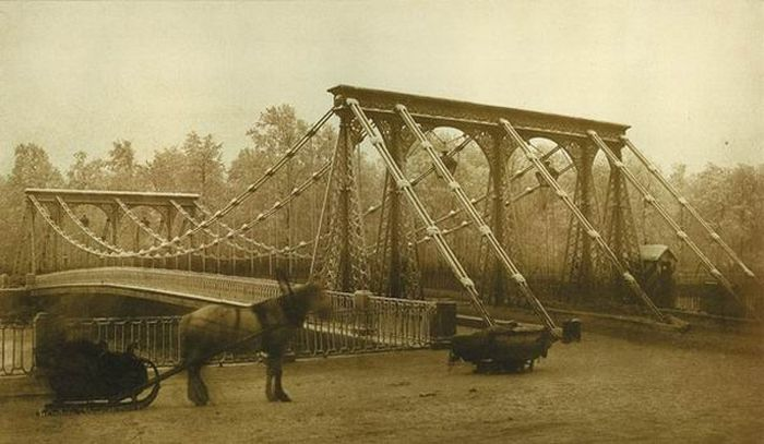 Цепной мост у Летнего сада